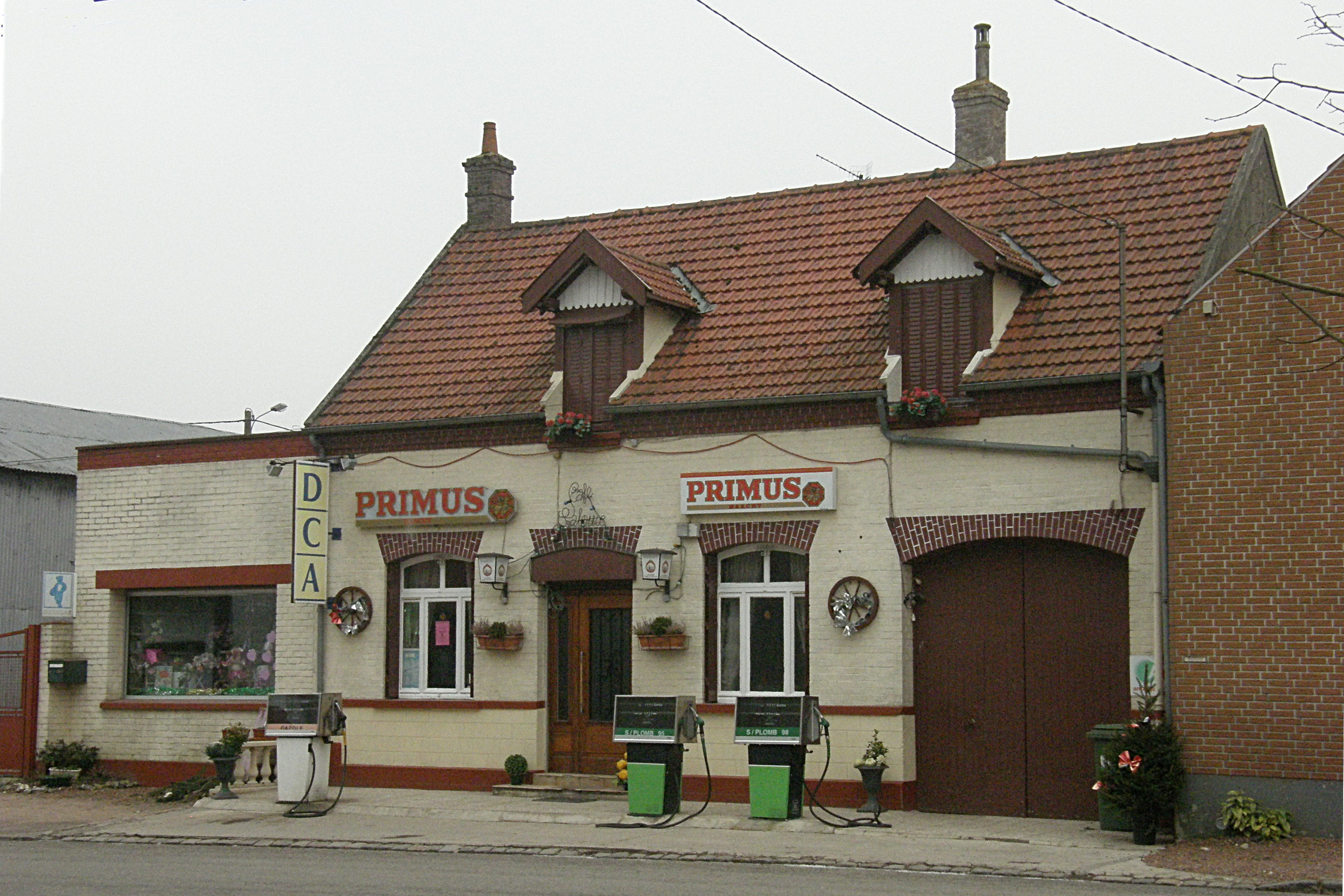 Boiry-Saint-Martin (Pas-de-Calais, France). Station-service, dans la rue de la Mairie. Les pompes à essence "à l'ancienne" sont de plus en plus rares dans la région.